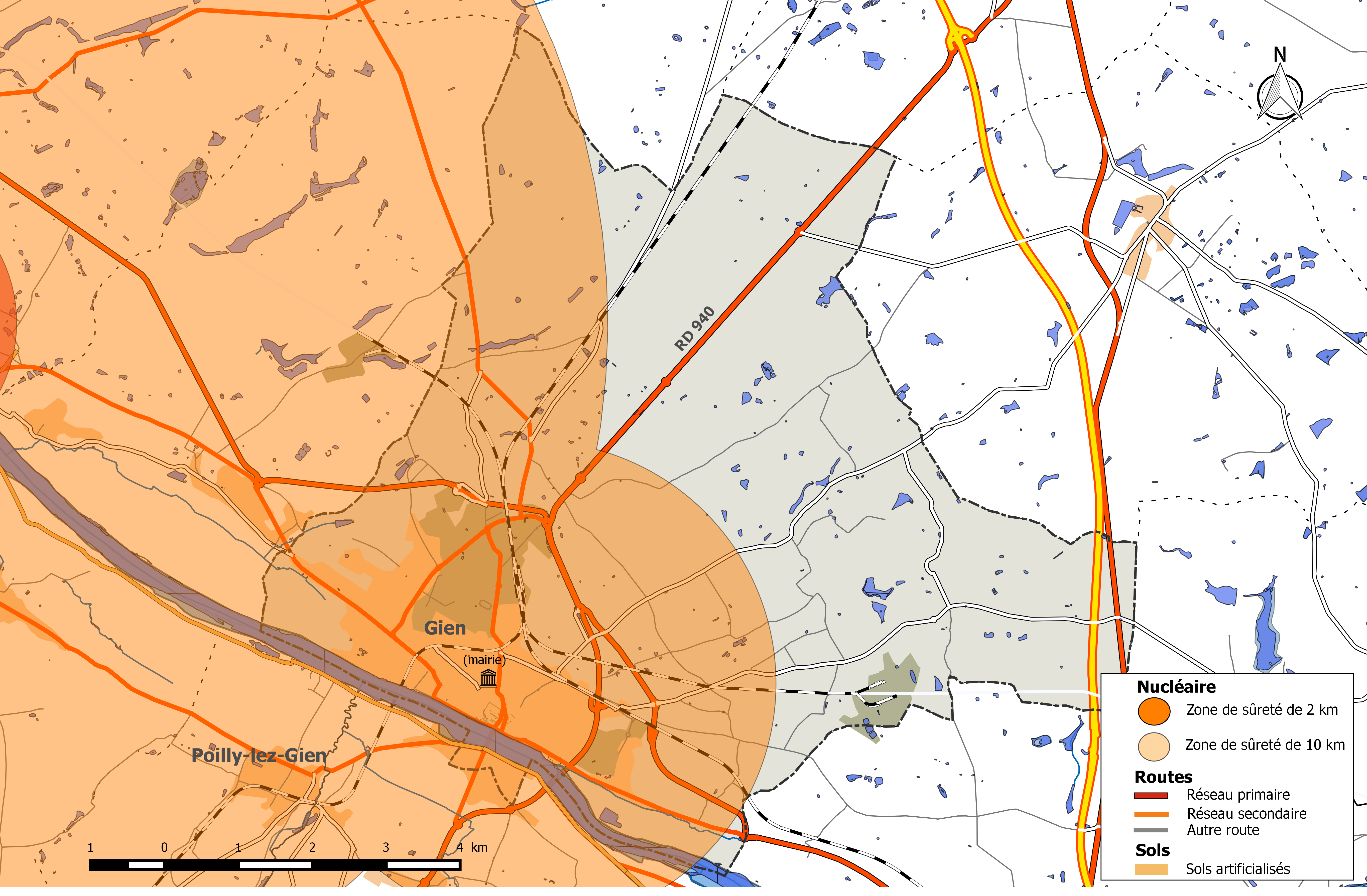 Zones de sûreté 2 km et 10 km autour de la centrale nucléaire de Dampierre - commune de Gien